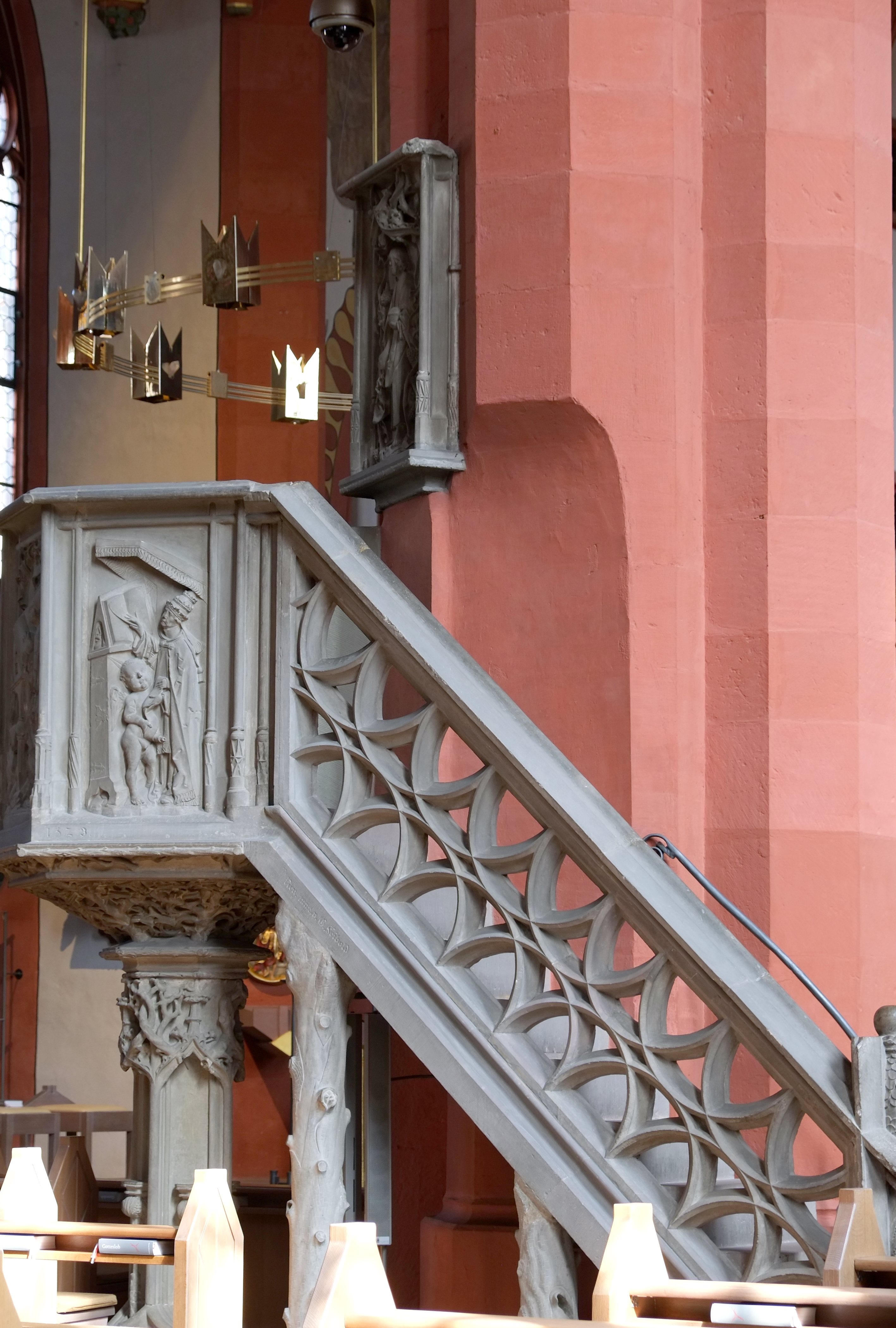 Spätgotische Kanzel (1523) in der katholischen Pfarrkirche St. Andreas in Karlstadt im Main-Spessart-Kreis (Bayern, Deutschland)